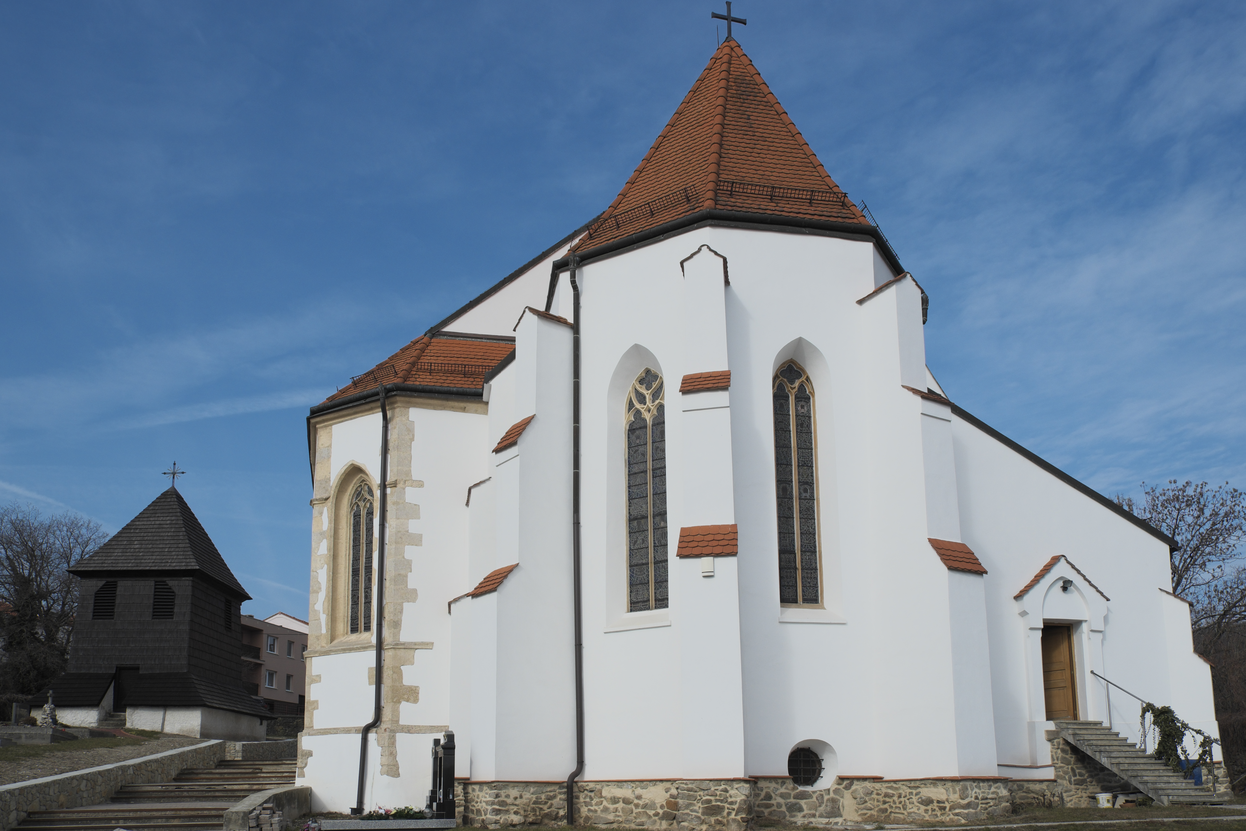 Katholische Pfarrkirche St. Georg in Svätý Jur (Slowakei), Apsis